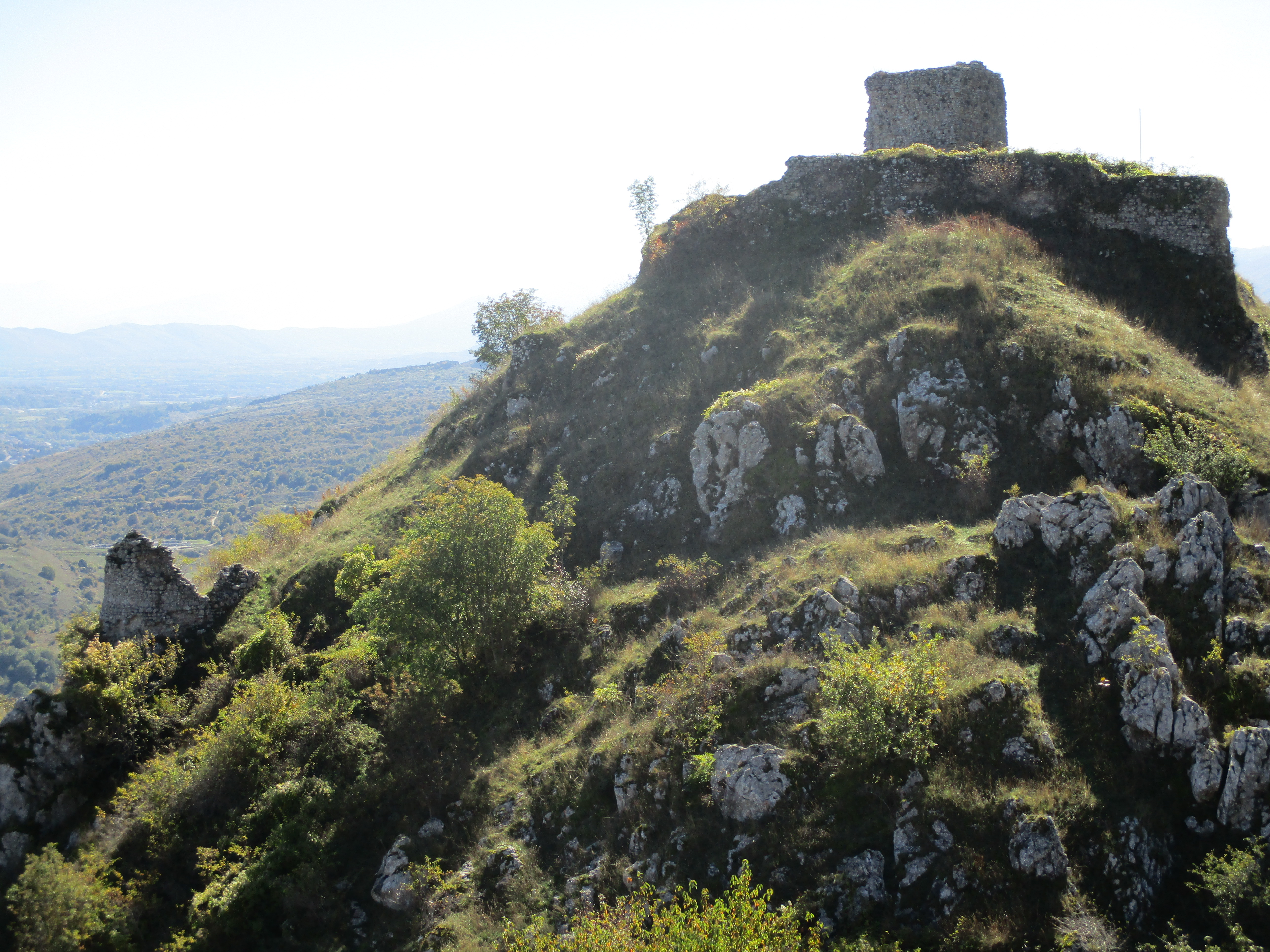 Ruderi del castello visti dal sentiero della Via Crucis